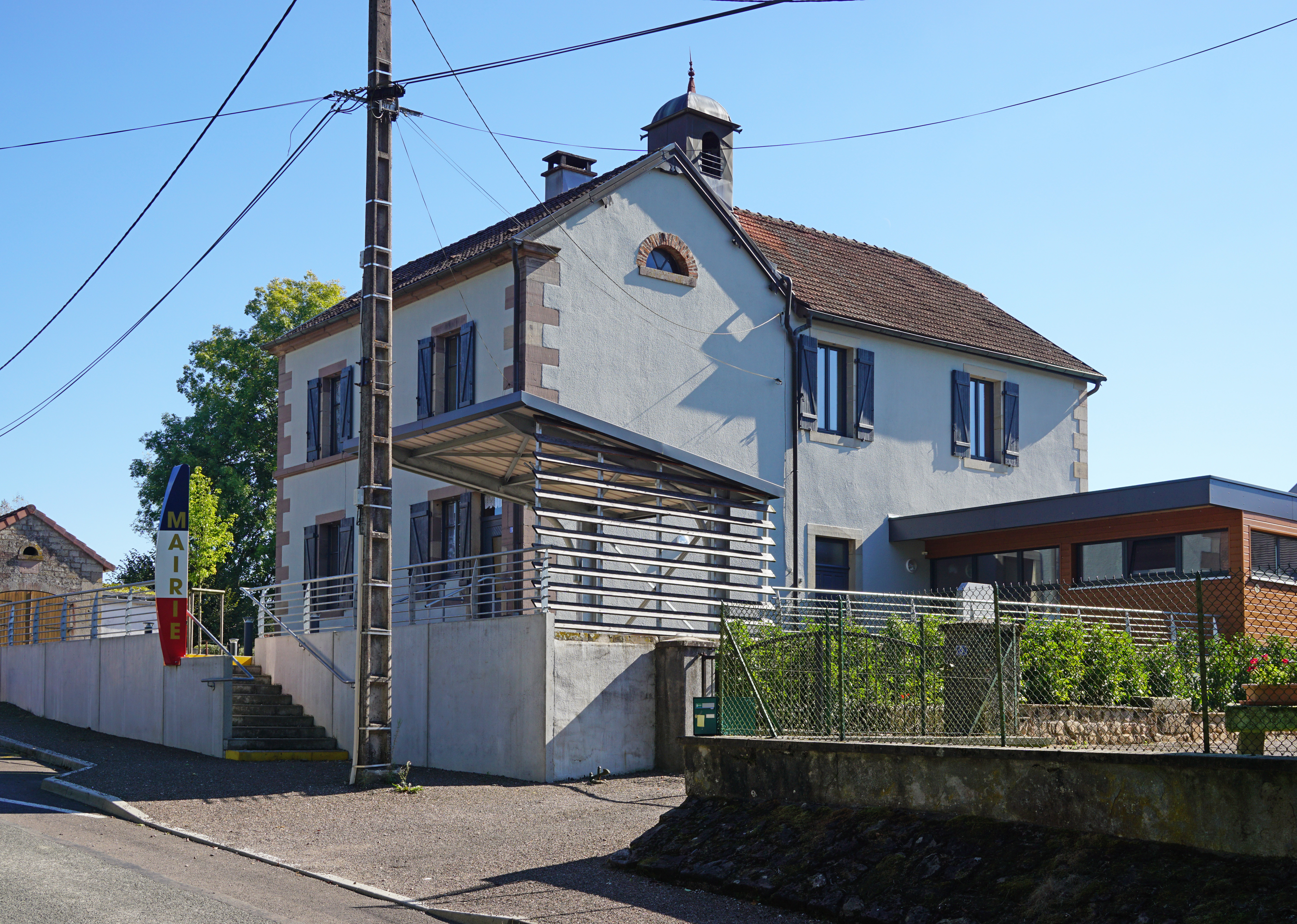 La mairie de Linexert.